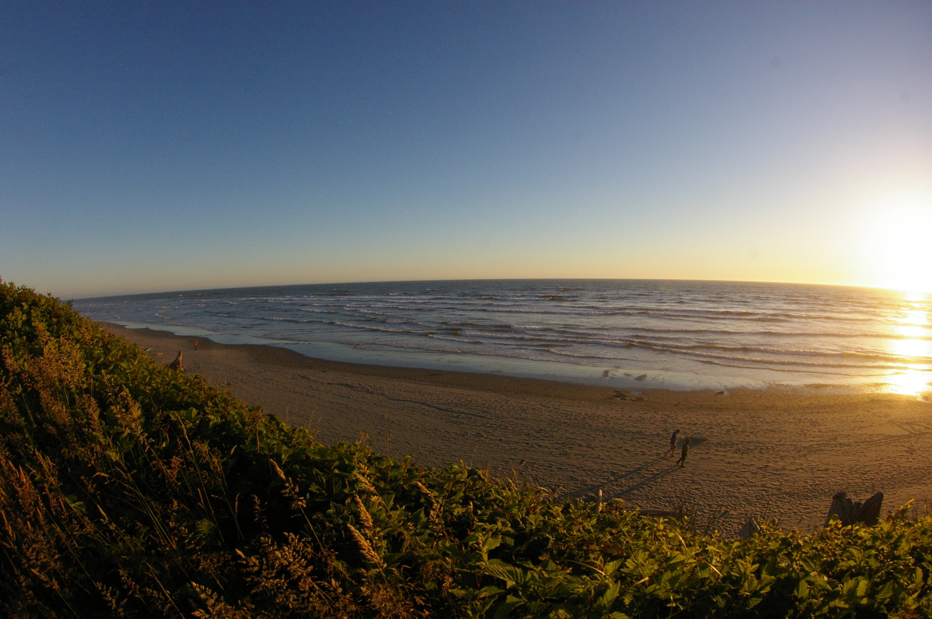 Kalaloch beach